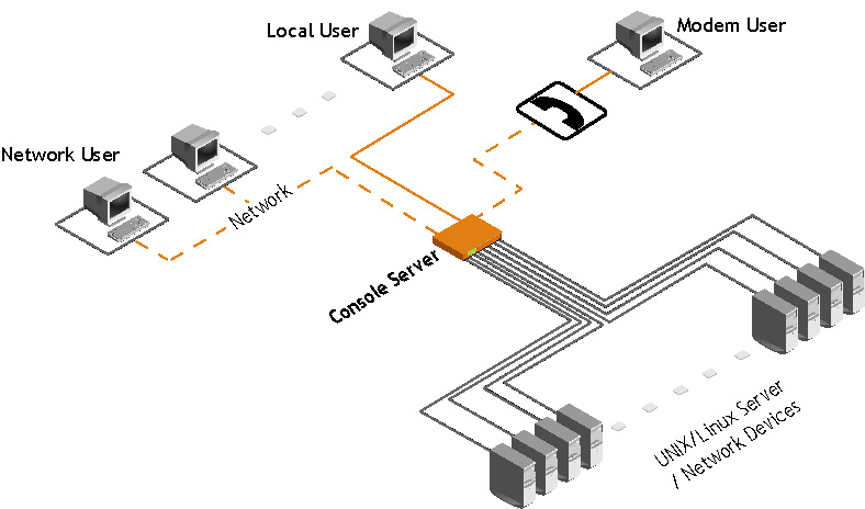 Console Server in Netzwerkumgebung